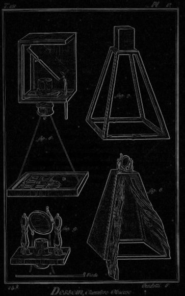 Camera Obscura mit horizontalem und vertikalem Sobel gefalten und kombiniert. Da auch negative Werte entstehen, wird der Nullpunkt als mittleres Grau dargestellt.